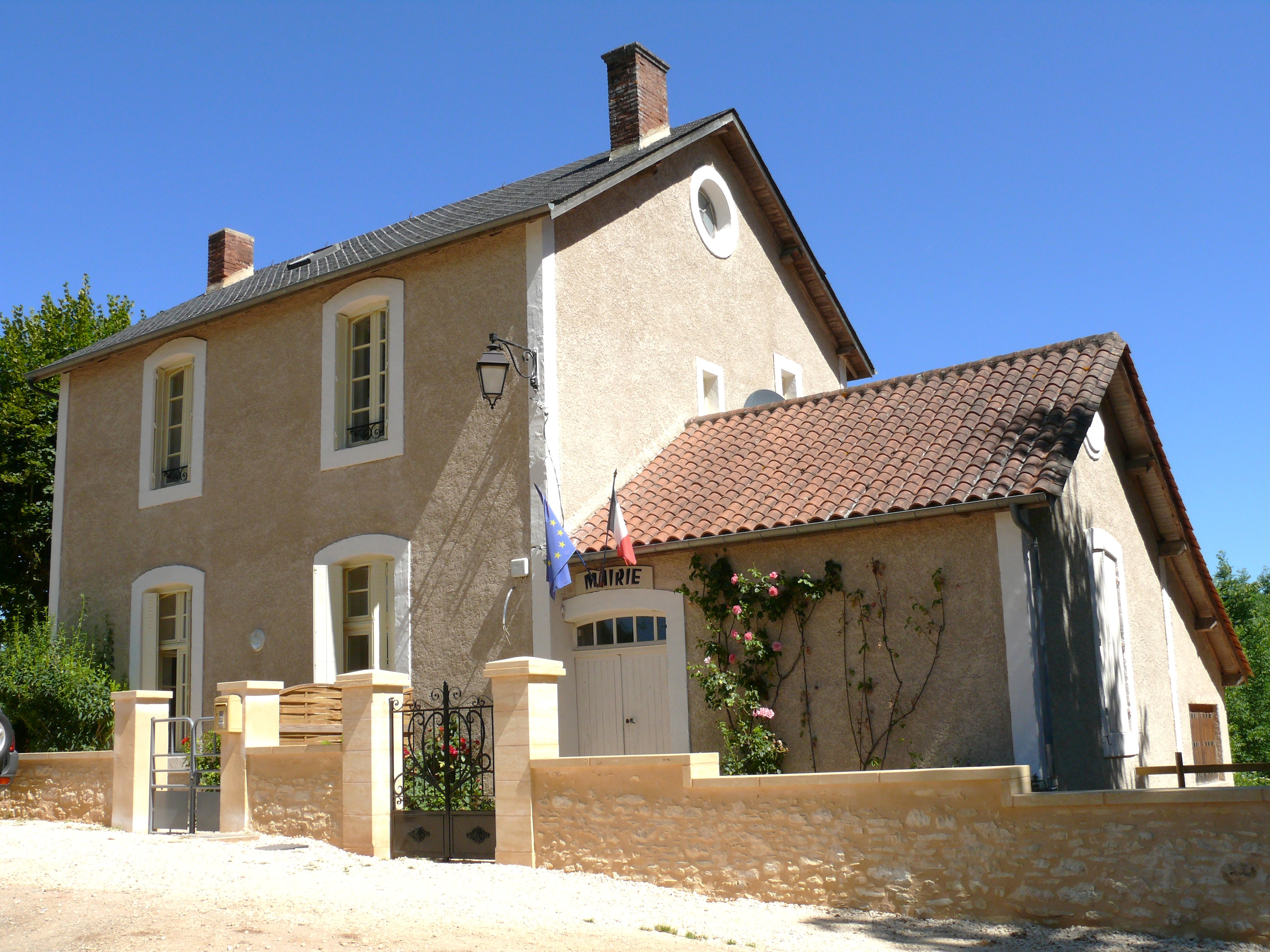 Lavaur (Dordogne) - Mairie